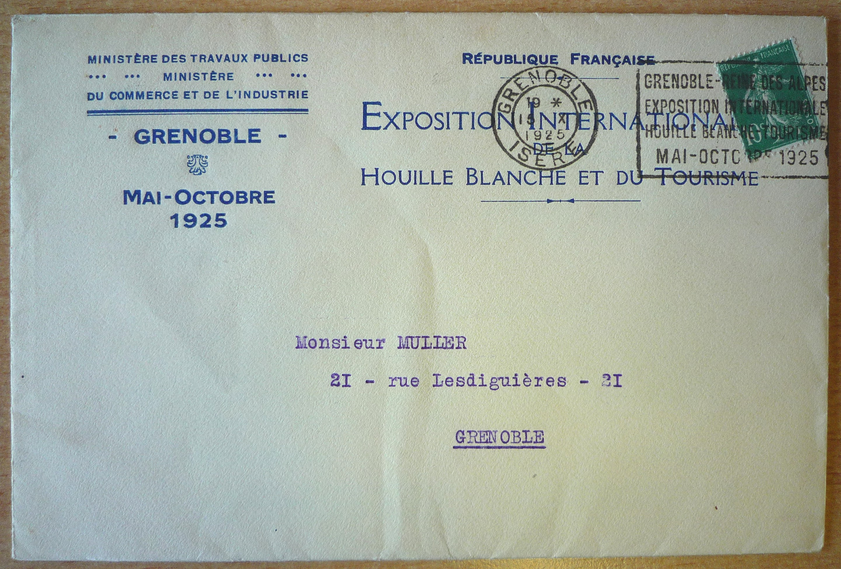 Courrier échangé entre le ministre et le conservateur du musée dauphinois en 1925 pour la préparation de l'exposition internationale de la houille et du tourisme à Grenoble.